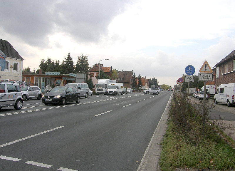 Das Bild zeigt die Sicht in Fahrtrichtung Nienburg / Bremen, an der Kreuzung mit den Straßen "Rote Reihe" auf der Ostseite (Standort) und der "Baßriede". Die kreuzenden Straßen befinden sich beide im Rücken des Fotografen). Der abgebildete Abschnitt soll ab Juni 2010 mit einem mittleren Grünstreifen ausgebaut werden, wodurch es bis ca Herbst 2011 zu einer Beschränkung auf nur eine Spur je Fahrtrichtung kommen wird. Die Ausbaumaßnahme für den 3 Meter breiten Grünstreifen wird auf 3 Kilometer Länge erfolgen.